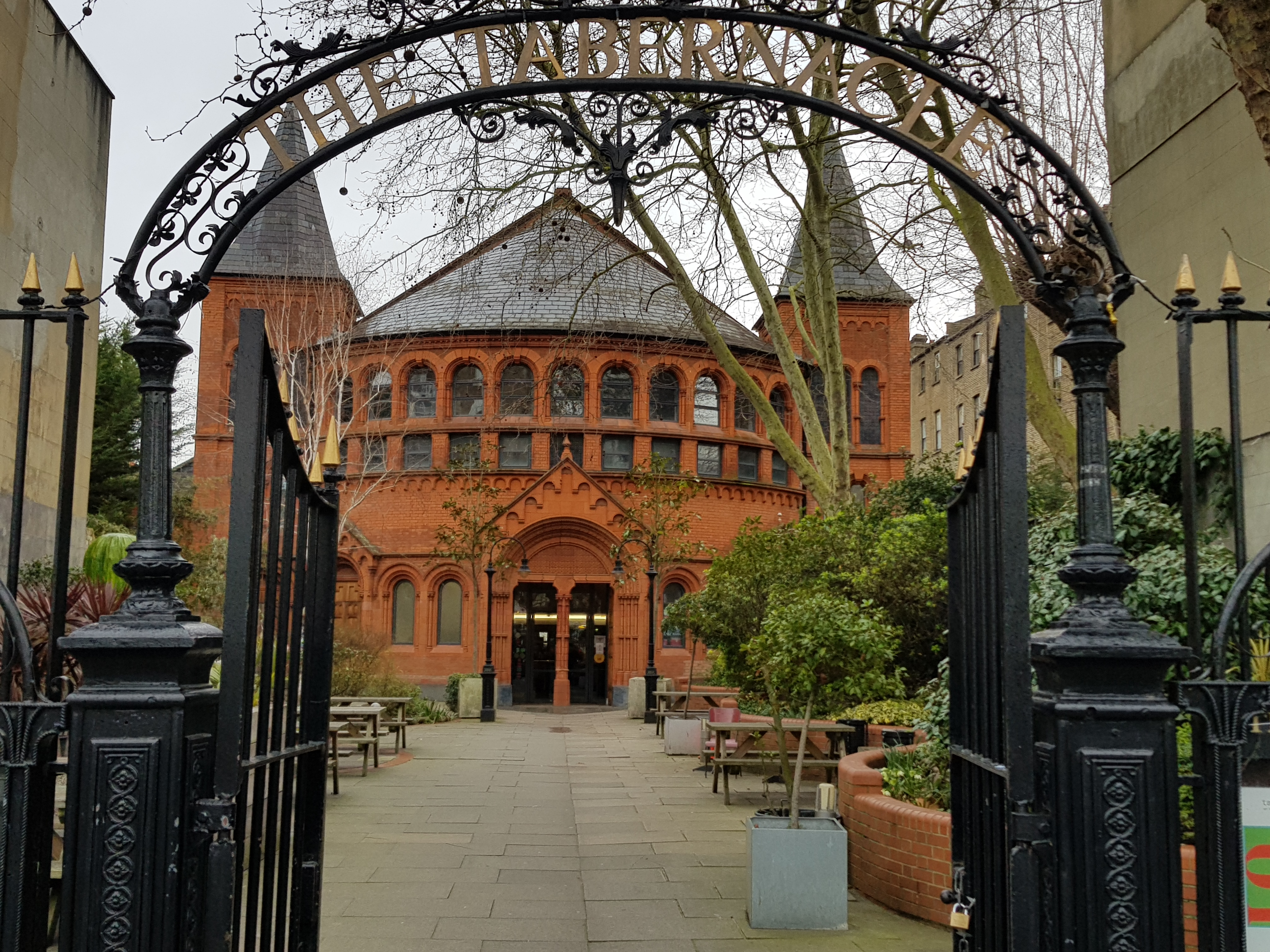 The Tabernacle, Notting Hill, Londres.